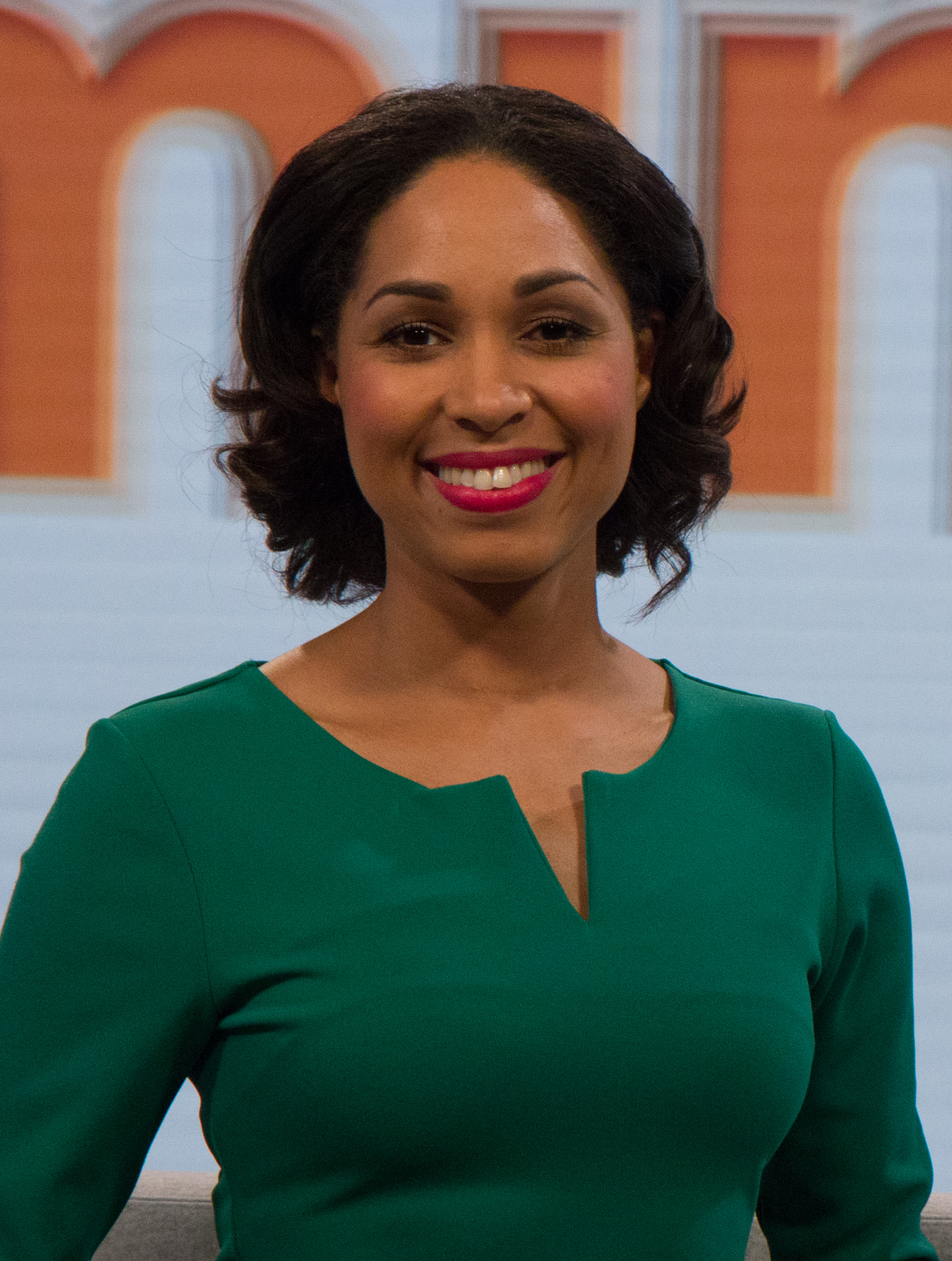 Pressetermin des ZDF zum ZDF-Mittagsmagazin in der neuen Studiokulisse mit ZDF-Chefredakteur Peter Frey, Andreas Wunn, Leiter der neuen ZDF-Redaktion Tagesmagazine Berlin sowie der neuen "ZDF-Mittagsmagazin"-Moderatorin Jana Pareigis.